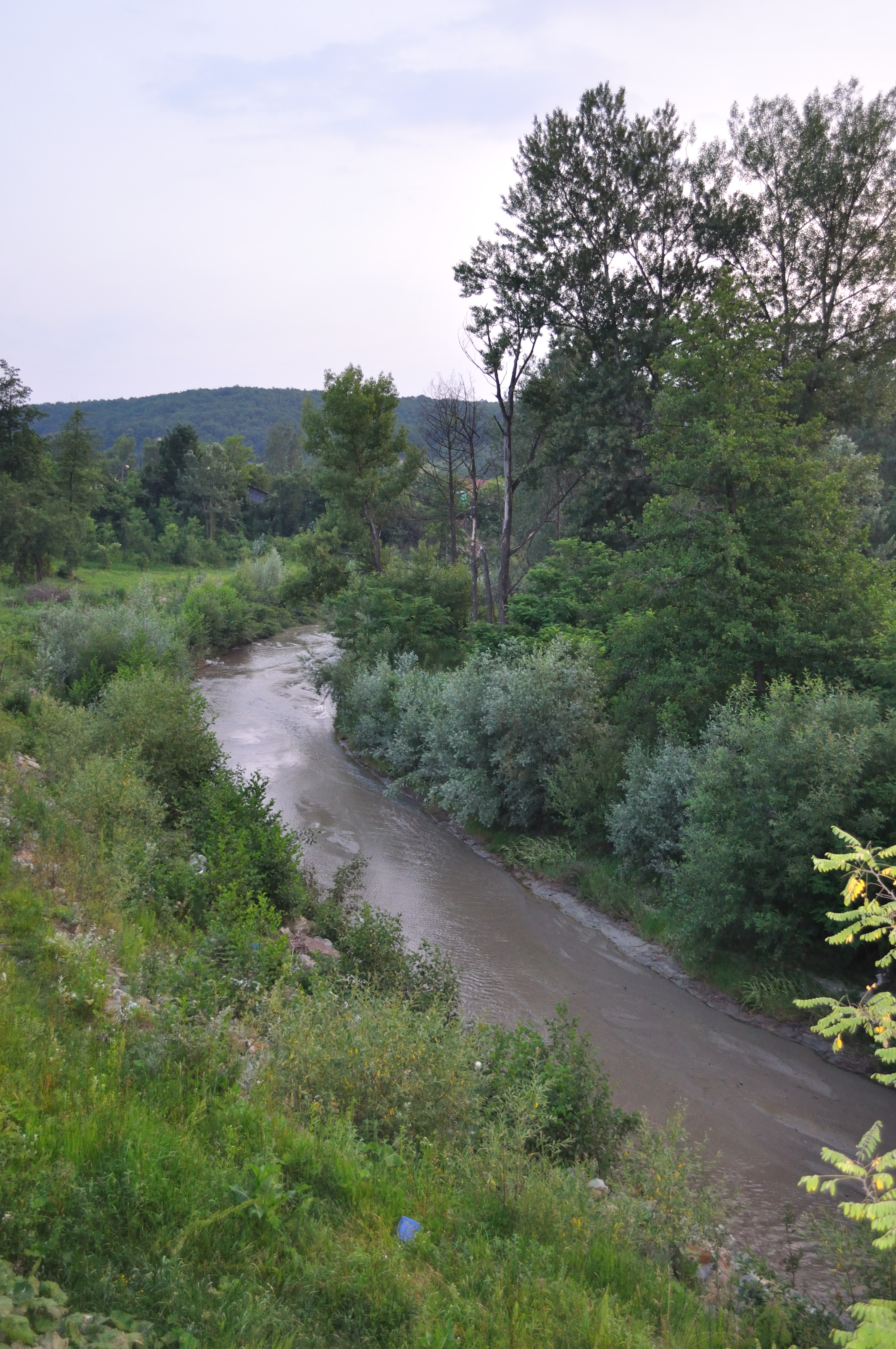 Râul Amaradia Pietroasă